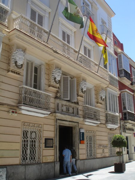 Rectorado de la Universidad de Cádiz (C/ Ancha, 10. Cádiz)